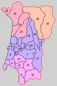 秋田県山本郡の町村。